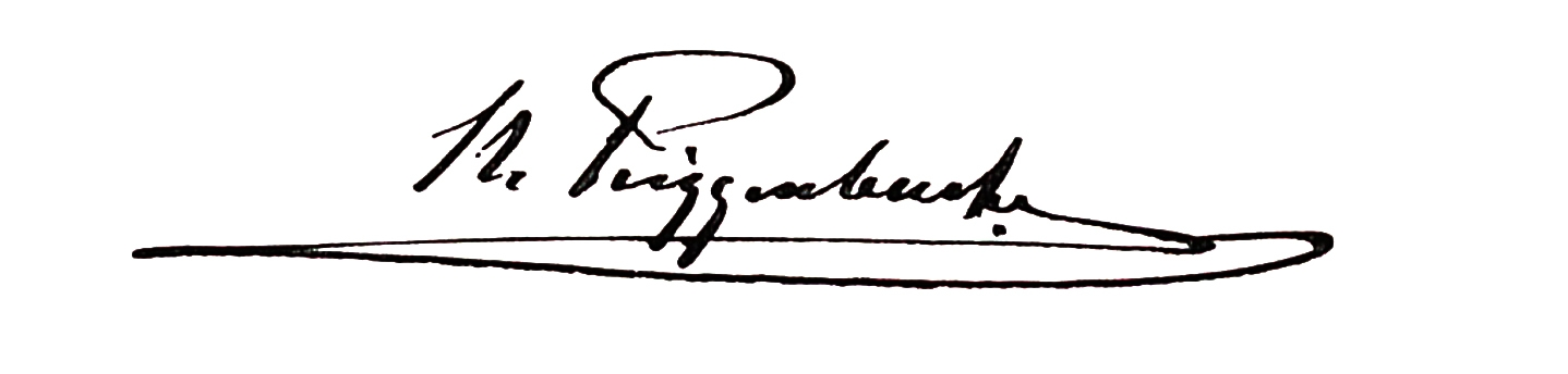 1896, Unterschrift von Niklaus Riggebbach (1817–1899)